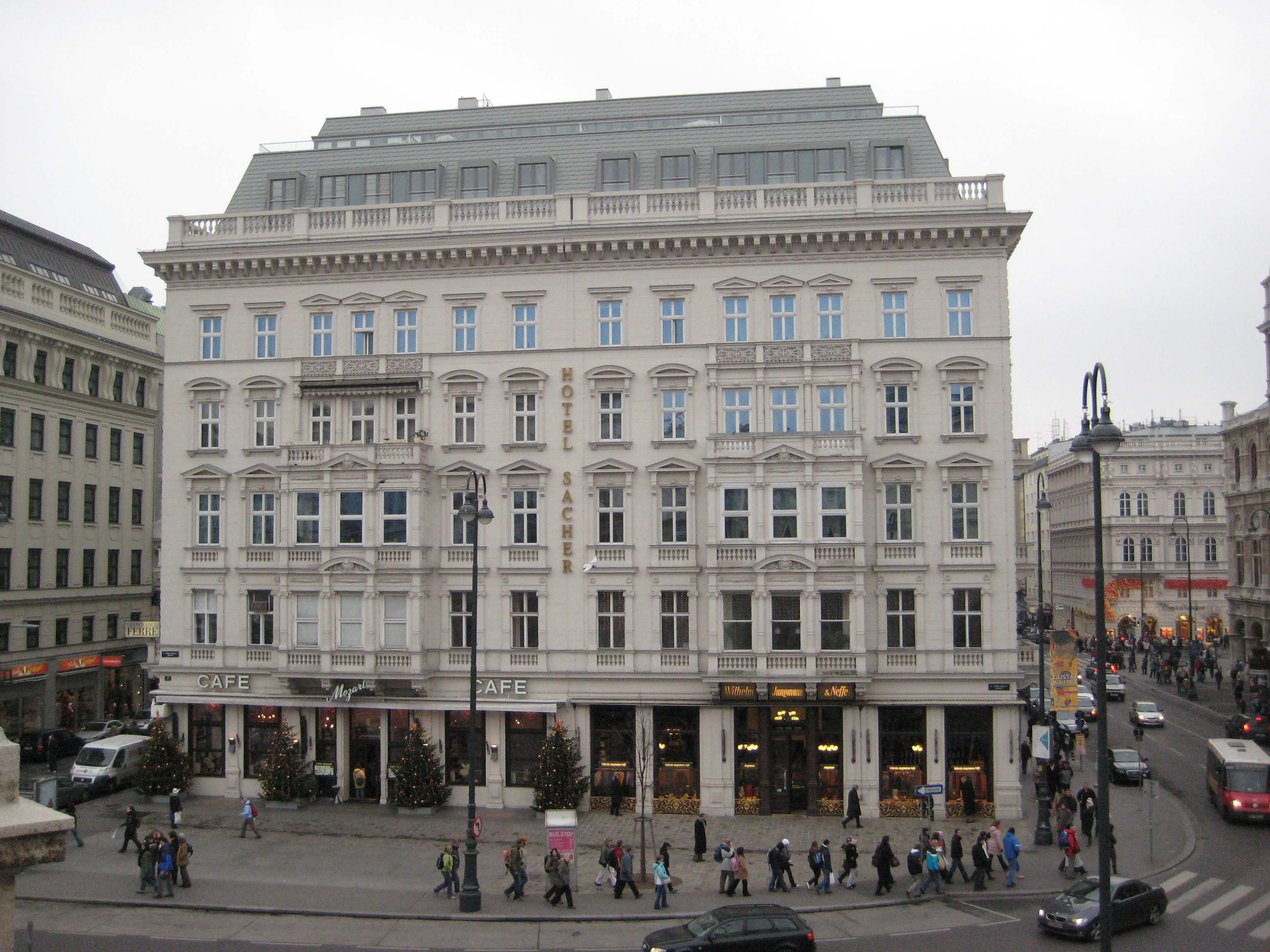 Hotel Sacher (Wien 2008)